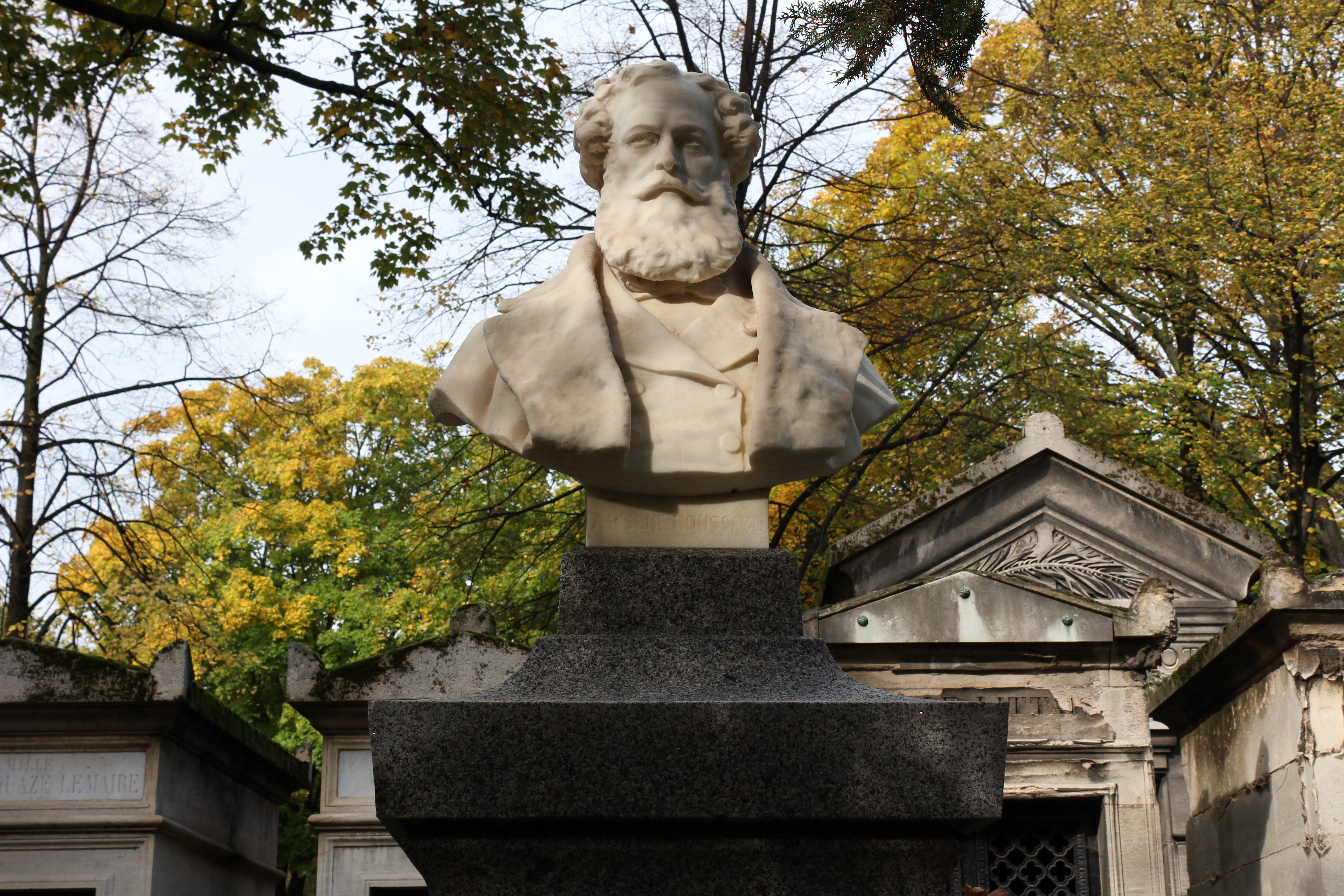 Sépulture d'Arsène Houssaye (1815-1896), écrivain et administrateur général de la Comédie-Française ; Stéphanie Bourgeois de Bucy (1822-1854), épouse en premières noces d'Arsène Houssaye ; Edmée Houssaye (1843-1846), fille d'Arsène et Stéphanie ; Marie-Jeanne-Nathalie Belloc (1838-1864), épouse en secondes noces ; Albert Houssaye (1864-1888), fils d'Arsène et Marie-Jeanne-Nathalie.